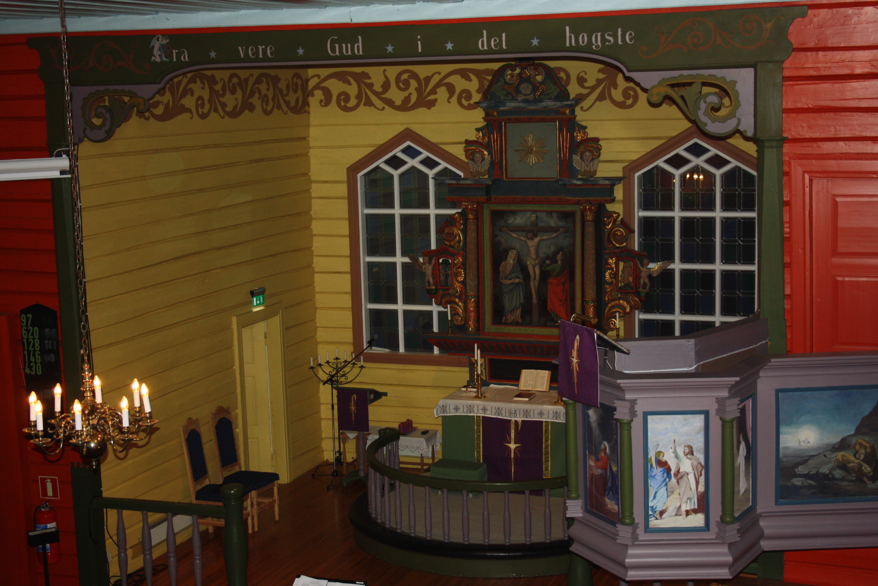 Altaret i Grane kyrkja med altertavla frå 1600-talet, som tidlegare stod i Dolstad kyrkje. Over altaret står det «Æra vere Gud i det høgste»